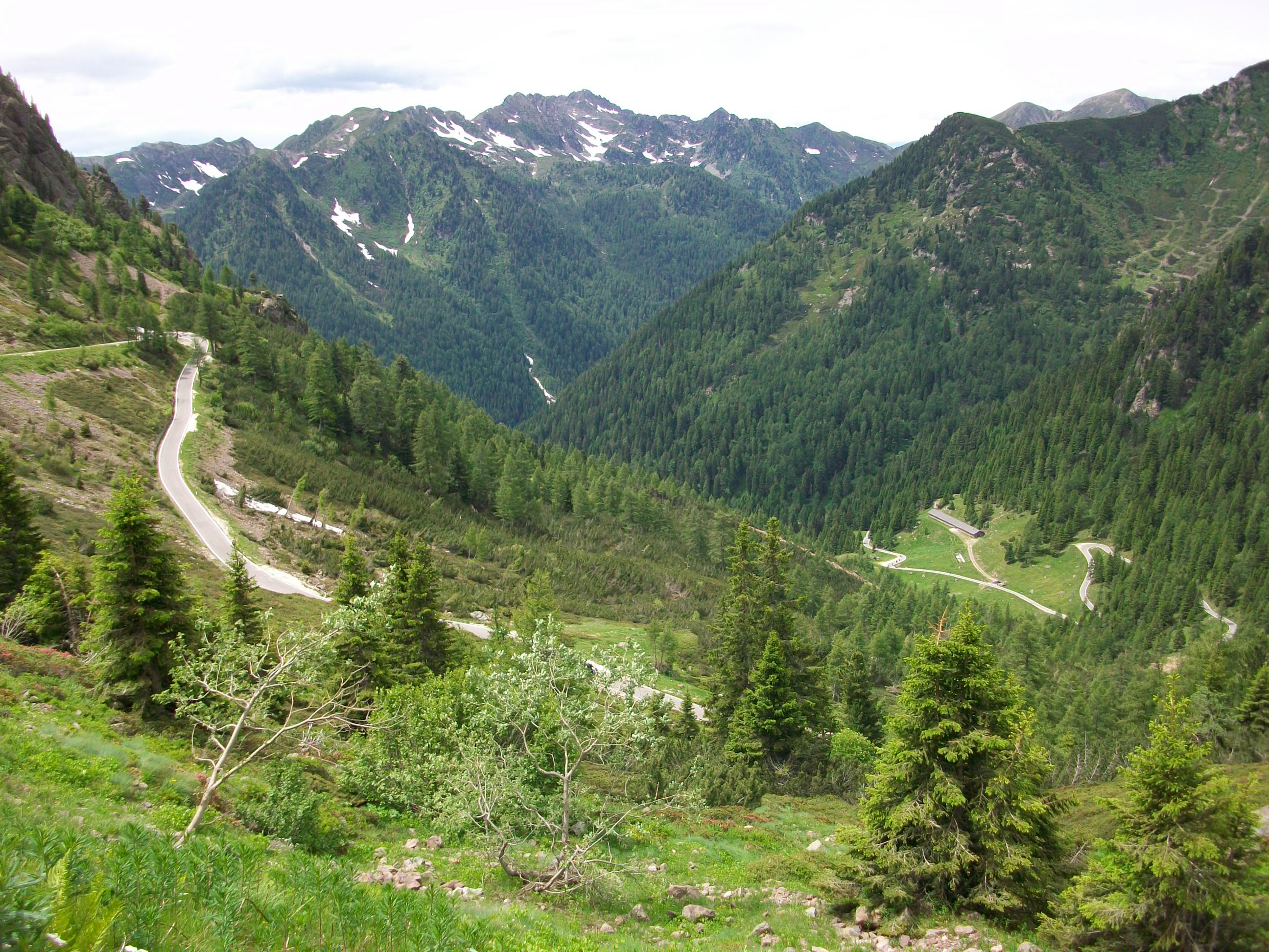 cesta na Passo Manghen